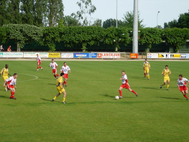 Le Racing Club Fléchois (en rouge et blanc) face à Joué-les-Tours en 2005.